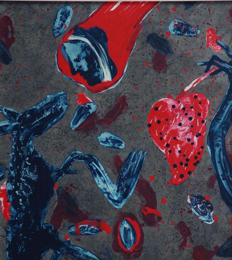 Onder elite 83 cm x 91 cm - Acryl